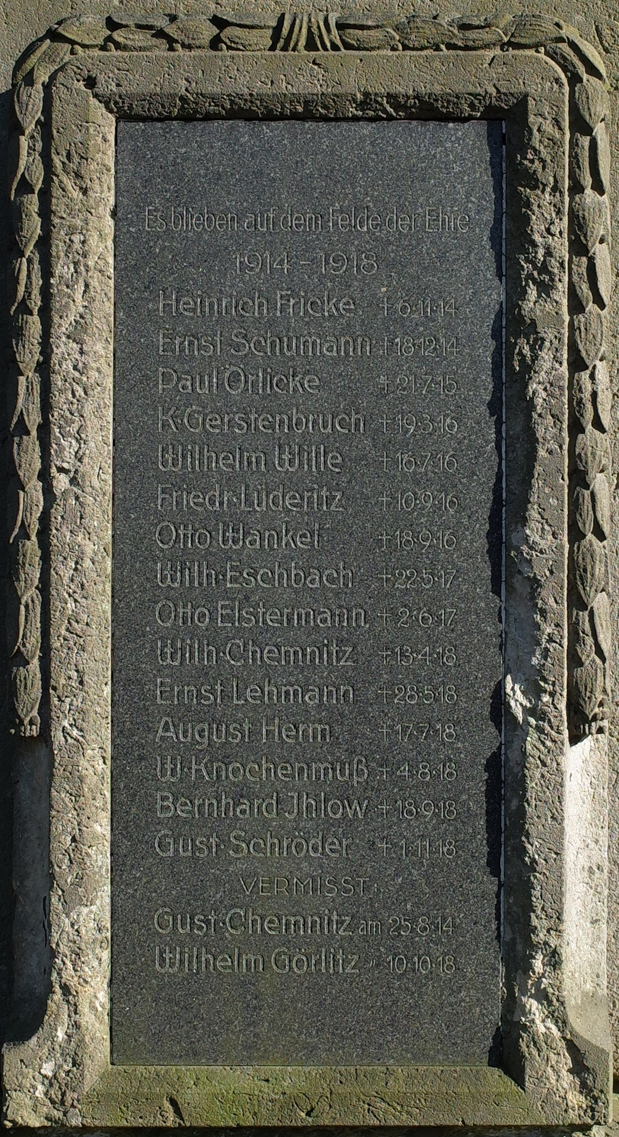 Gommern, Kriegerdenkmal im Ortsteil Menz